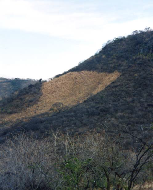 agroecosistema mesoamericano